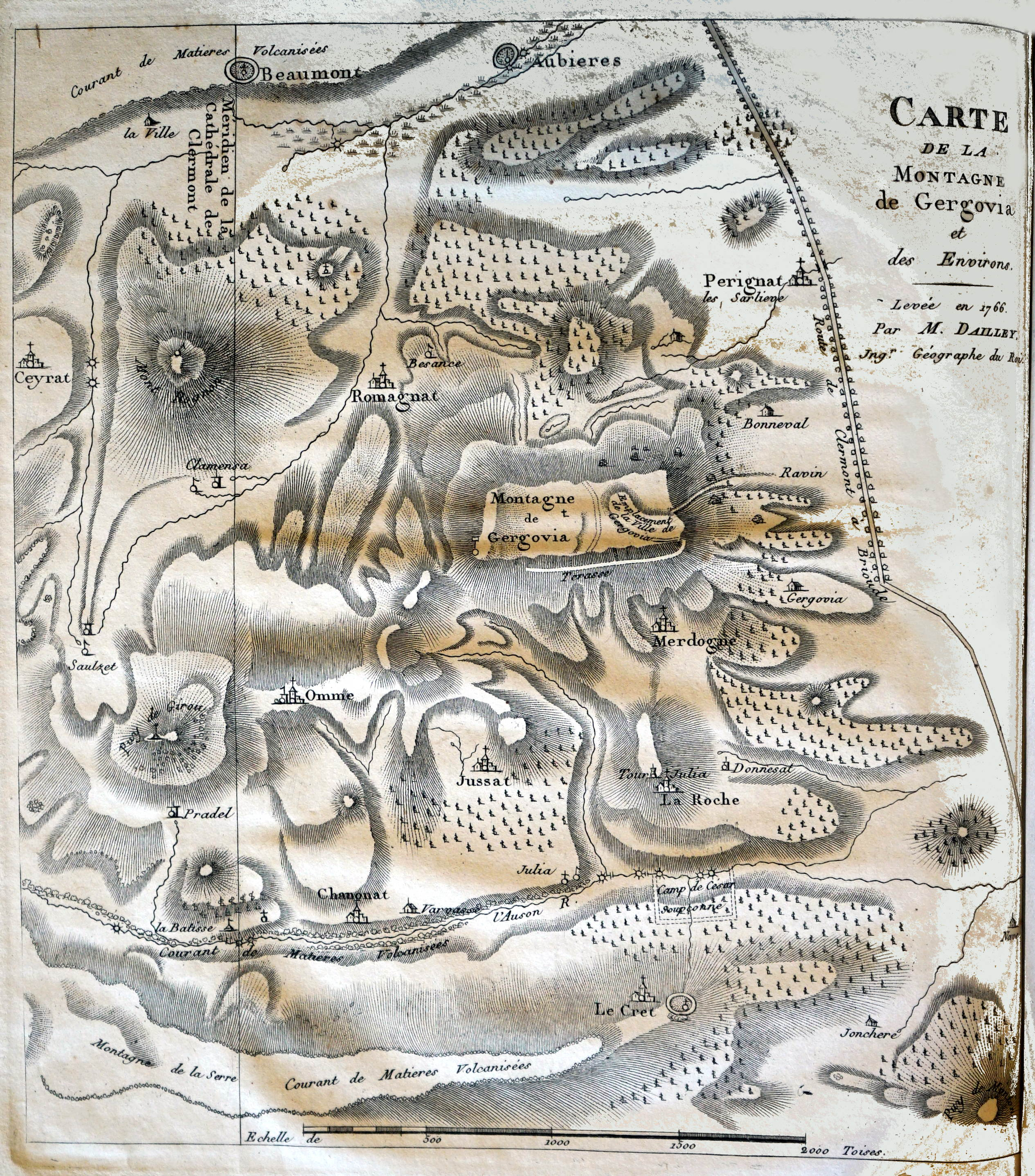 extrait du livre, carte de 1764.